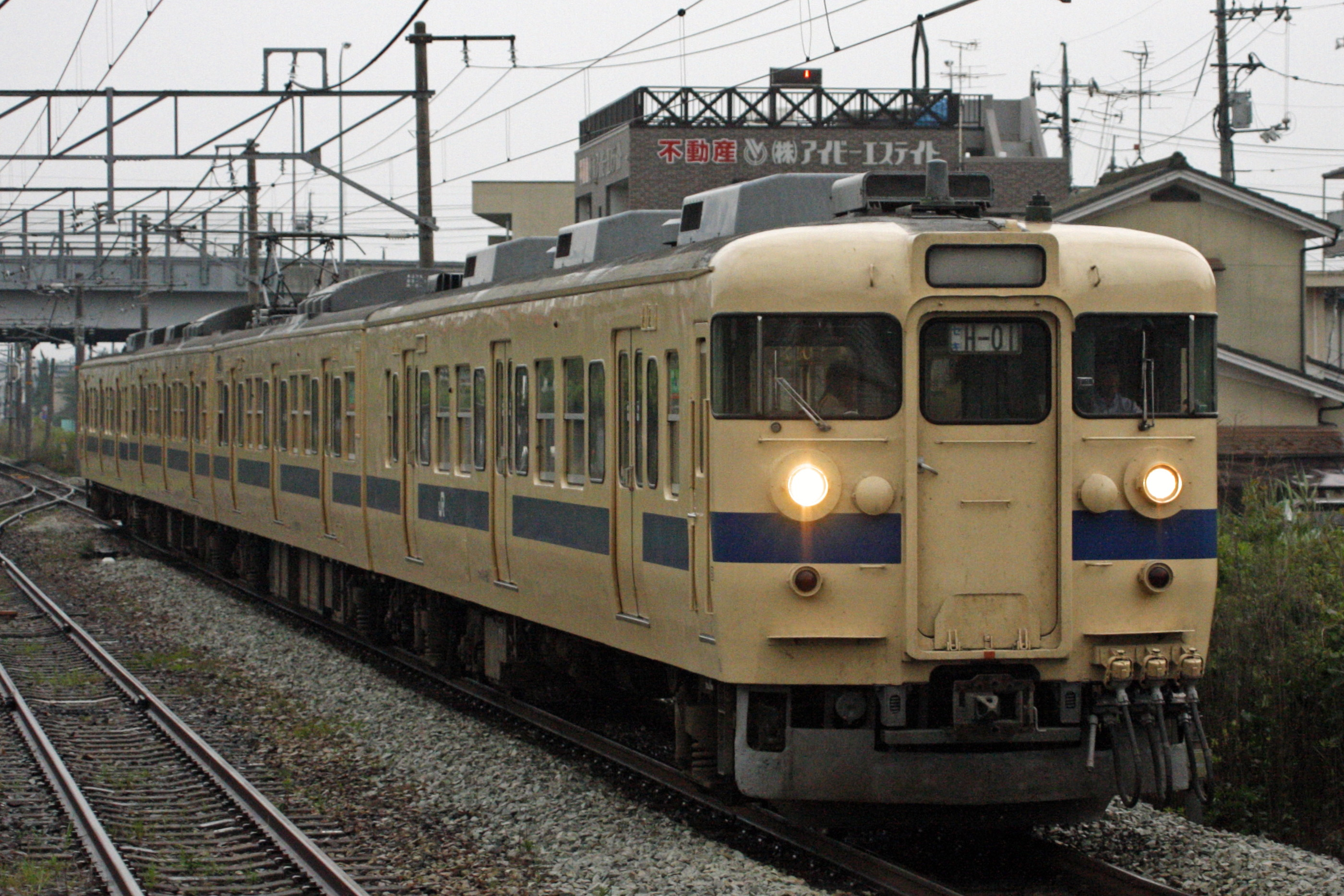 広セキH-01編成。両端のクハが111系という希少編成。山陽本線、中庄駅。